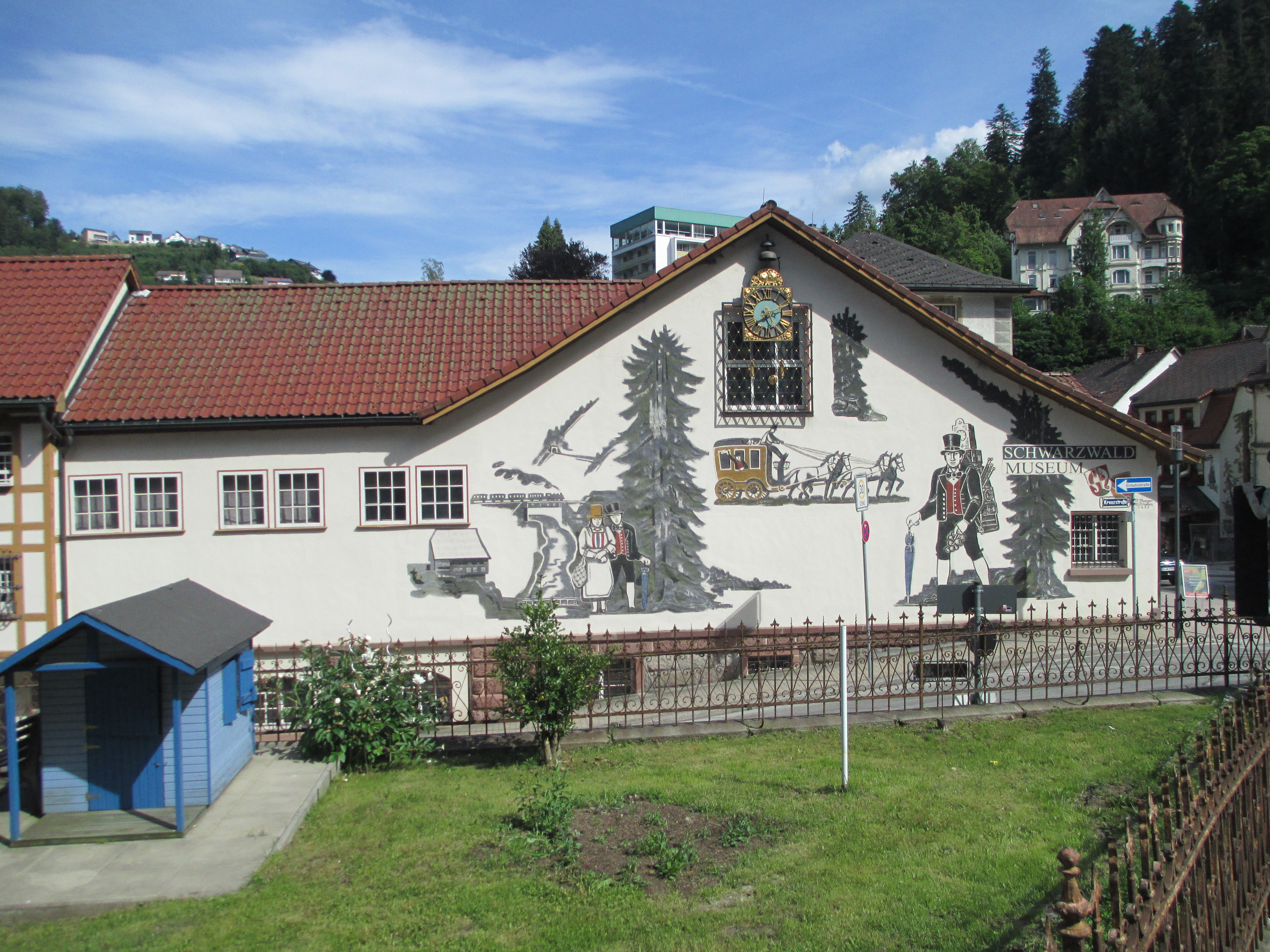 מוזיאון היער השחור בטריברג